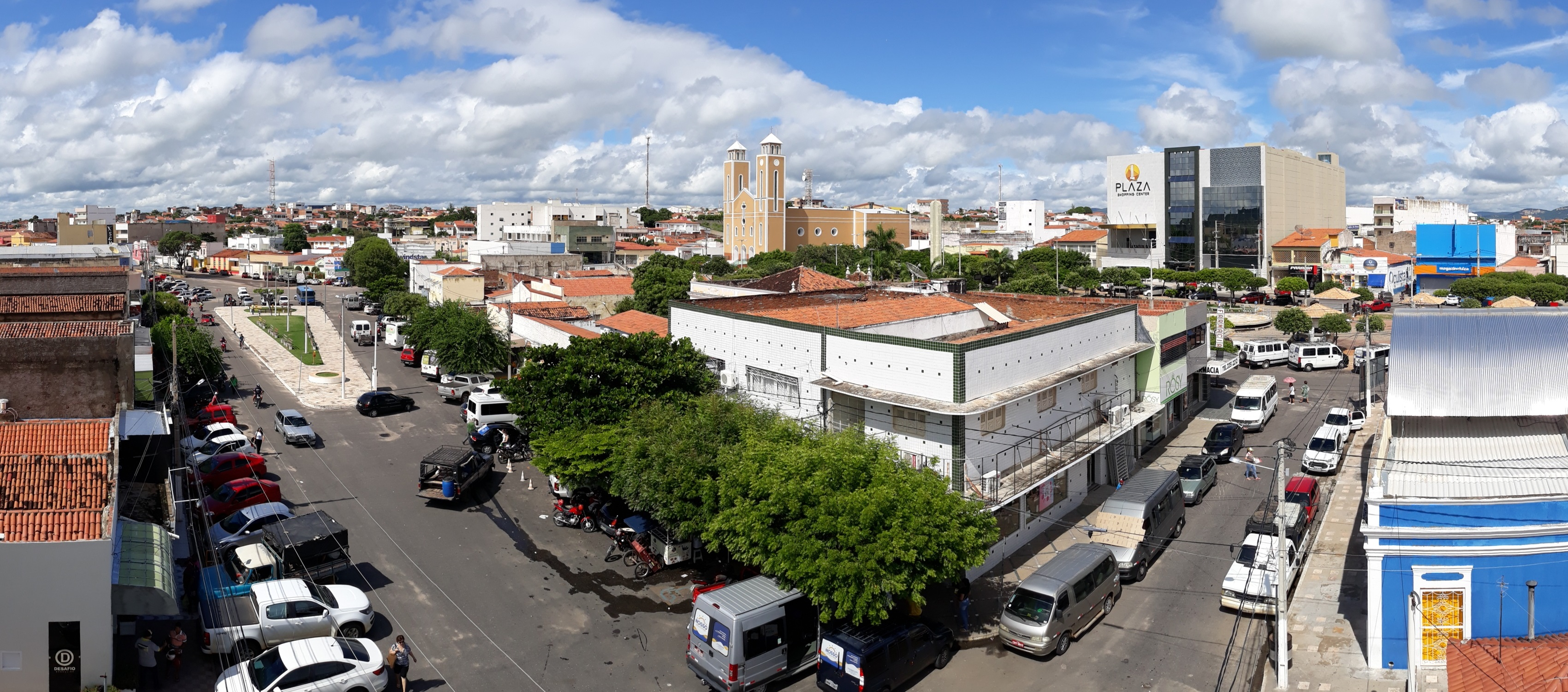 Centro da cidade de Pau dos Ferros, no Rio Grande do Norte (Brasil), com destaque para a Praça Nelson Maia (esquerda), a Igreja Matriz de Nossa Senhora da Conceição (fundo) e o Plaza Shopping Center (direita)